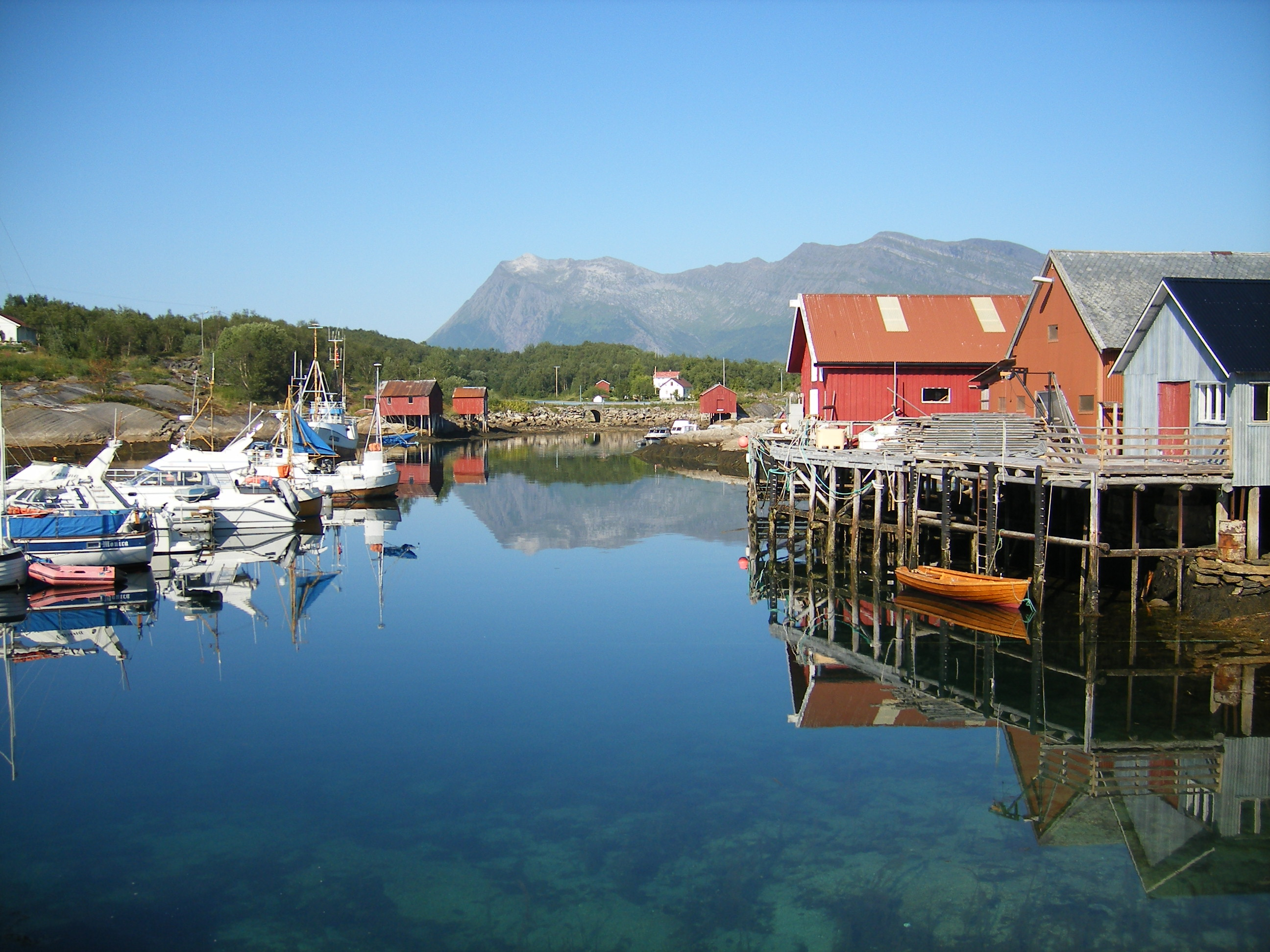 Inndyr, Gildeskål kommune, Norway